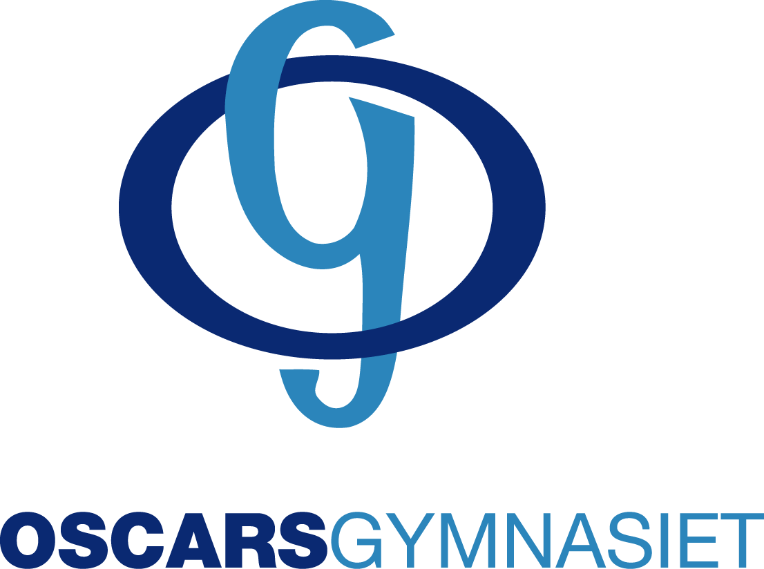 Detta är Oscarsgymnasiets logotyp.